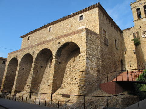 Castell d' Aro al Baix Empordà